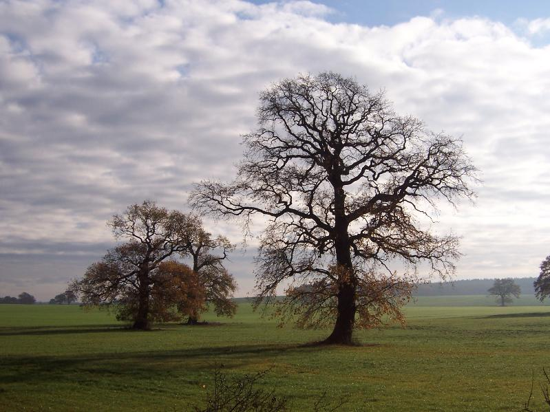 Hudeeichen bei Veelböken